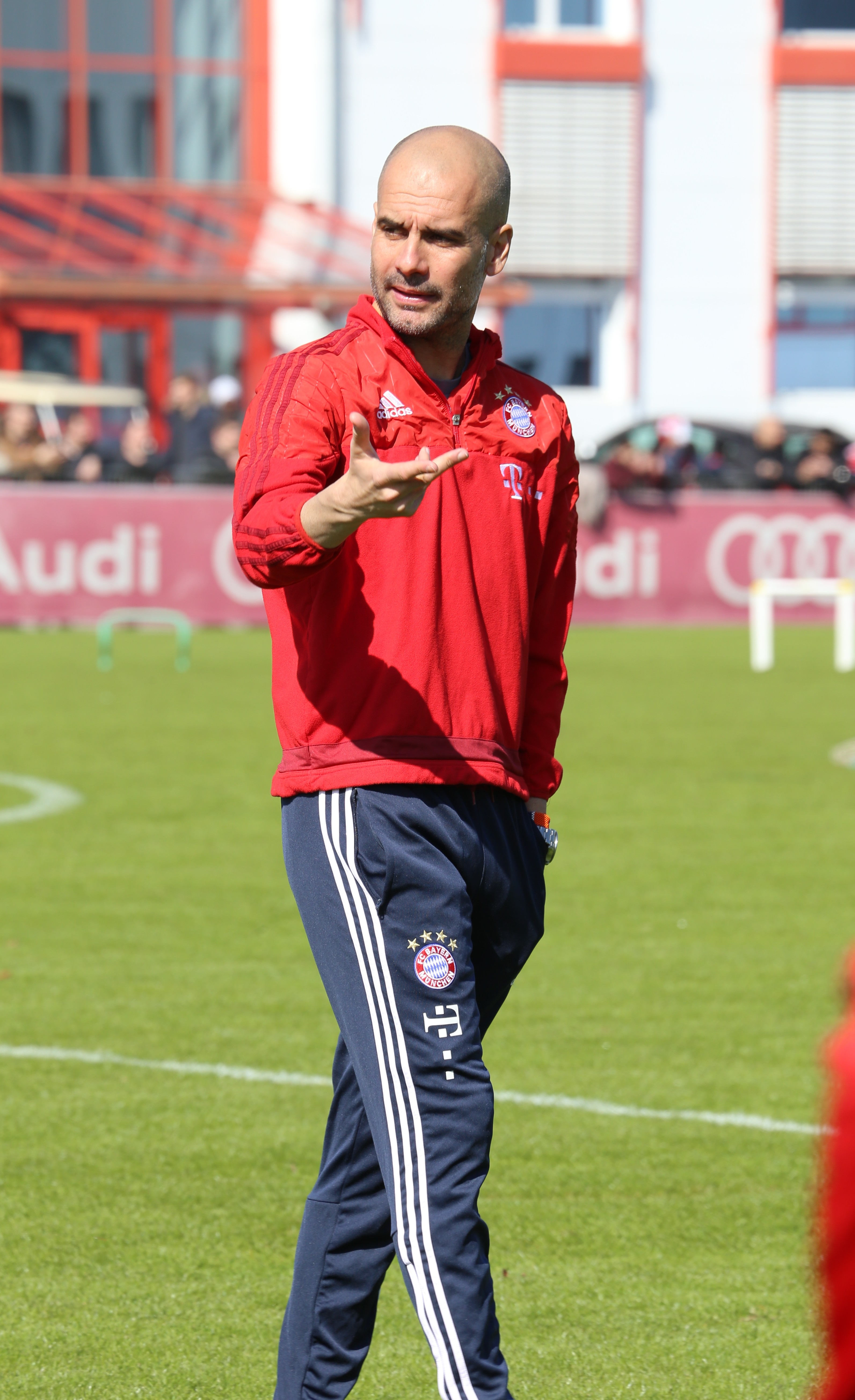 Pep Guardiola beim Training auf dem Gelände des FC Bayern München